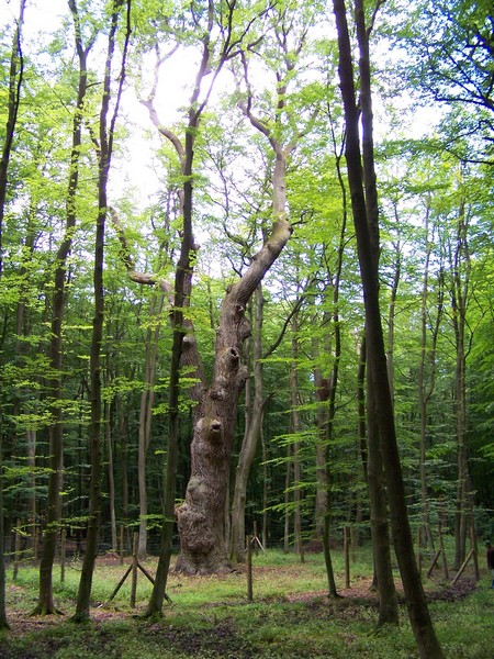 Najstarszy dąb w Polsce 800 lat